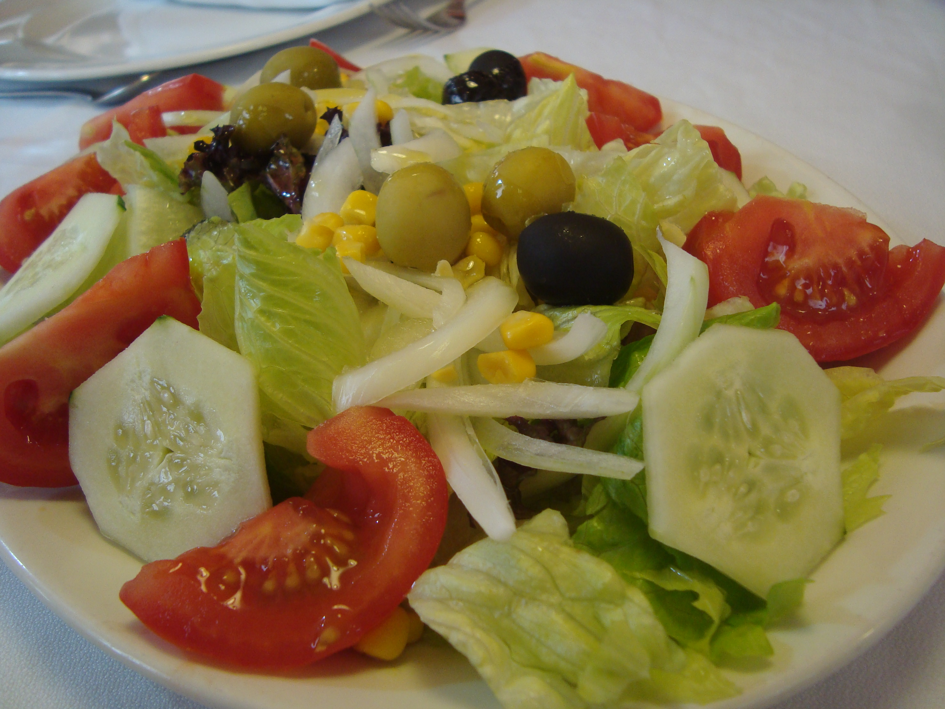 Ensalada Valenciana, estandarte de la Dieta Mediterránea, con productos e ingredientes de las huertas: lechugas, tomates, pepinos, aceitunas, cebollas…todo aliñado con vinagre, aceite de oliva y sal.